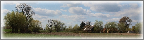 Samocice panorama